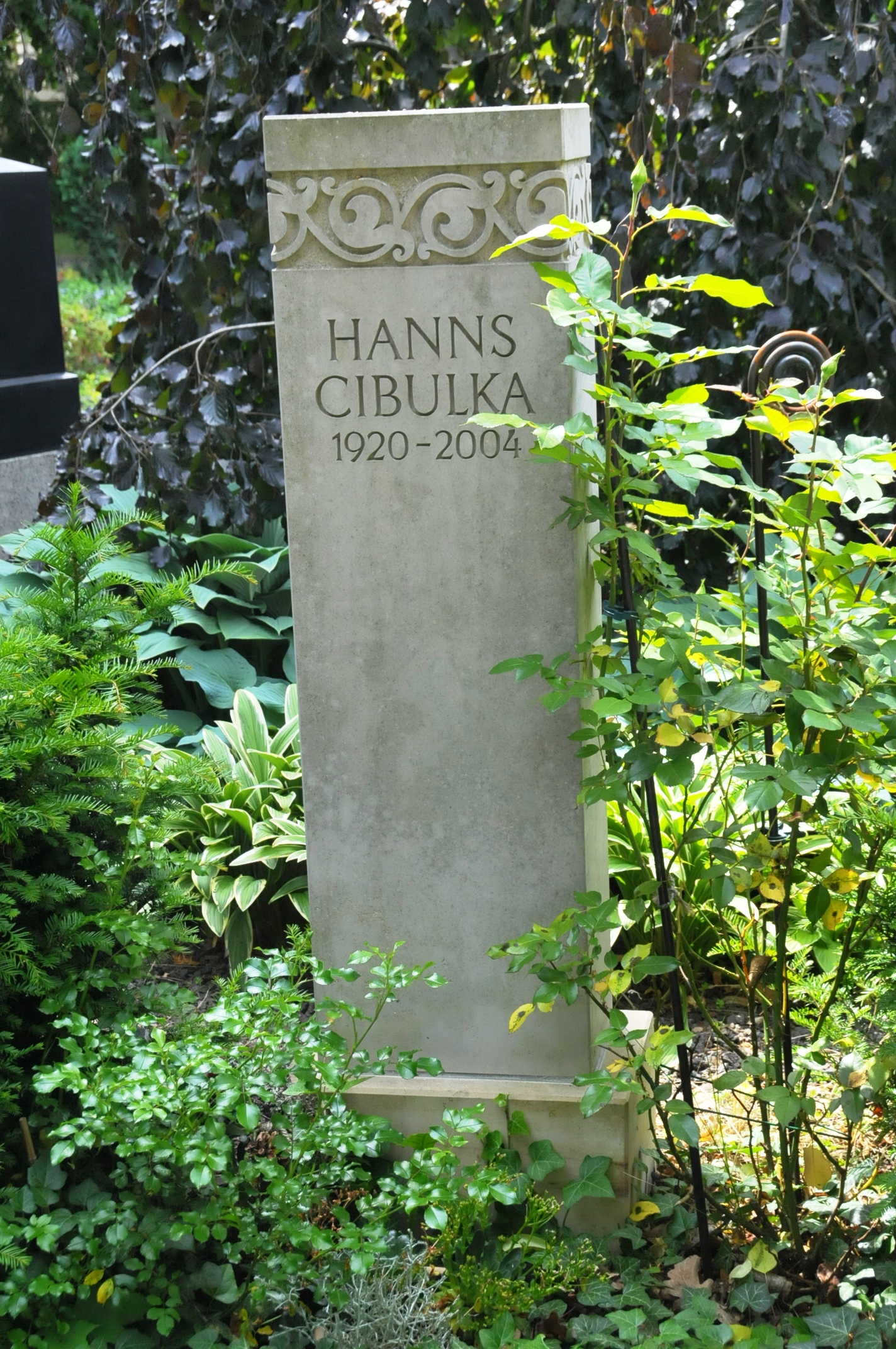 Grabstein von Hans Cibulka auf dem Hauptfriedhof Gotha